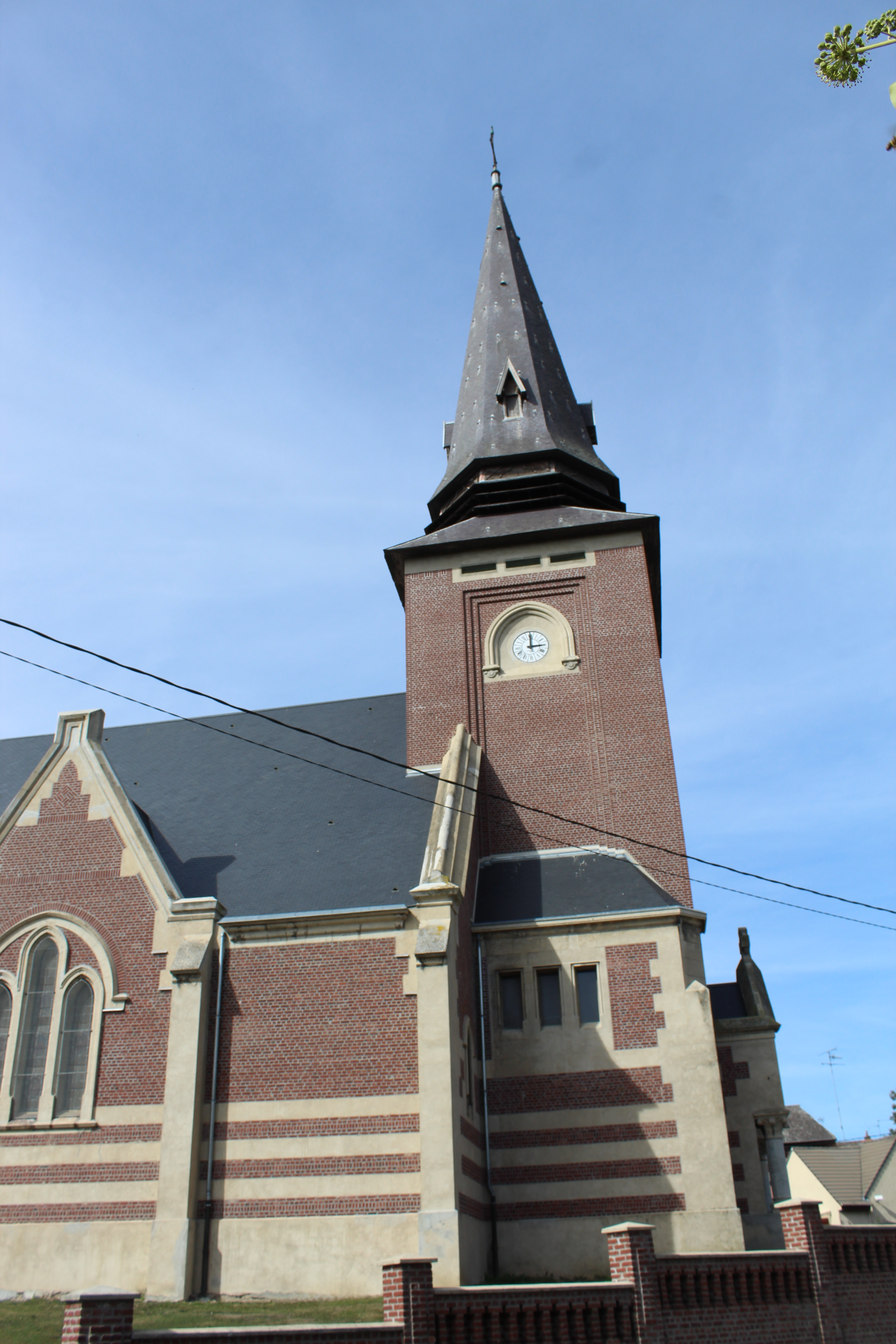 L'église.